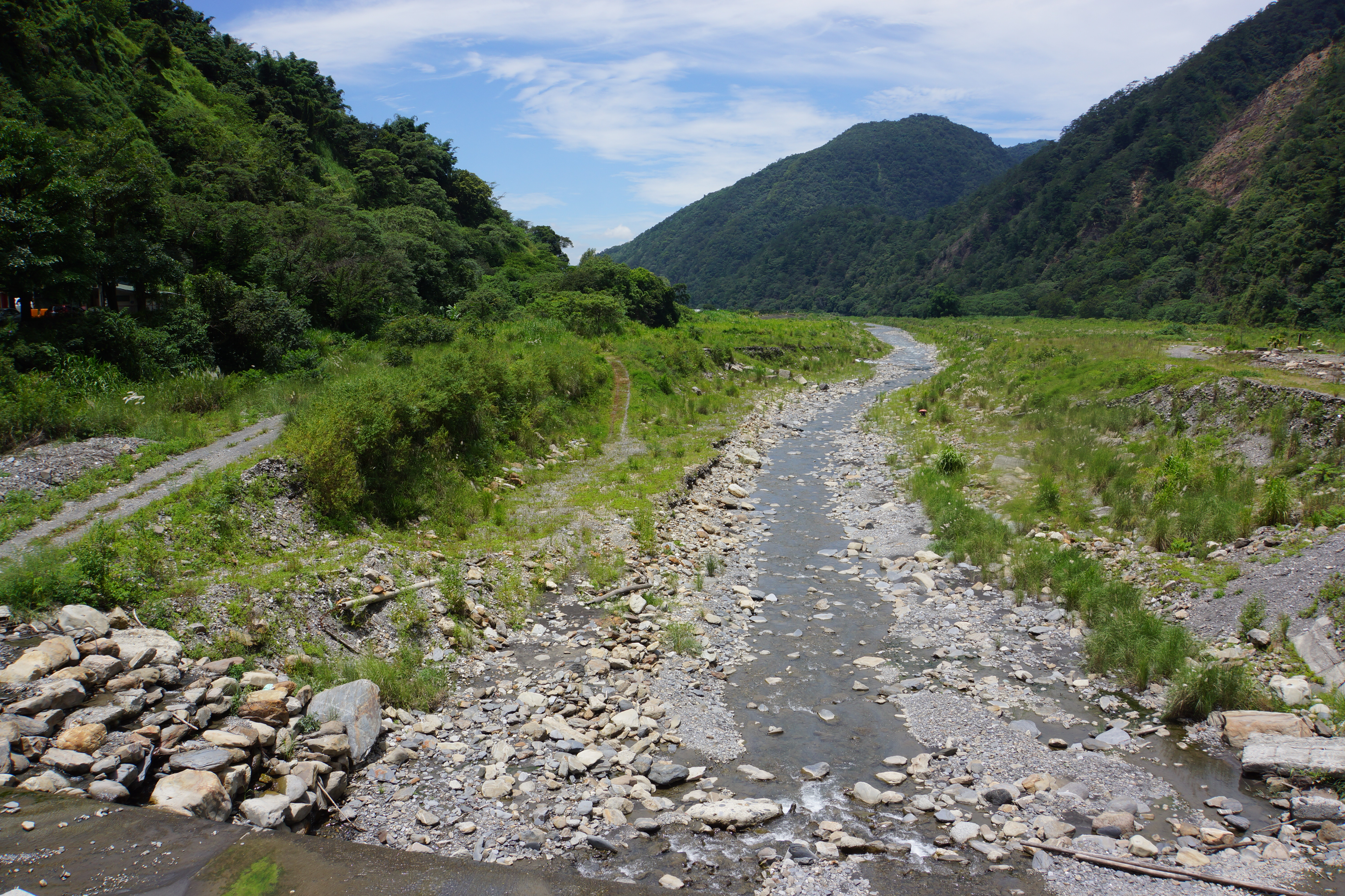 Mei River 眉溪